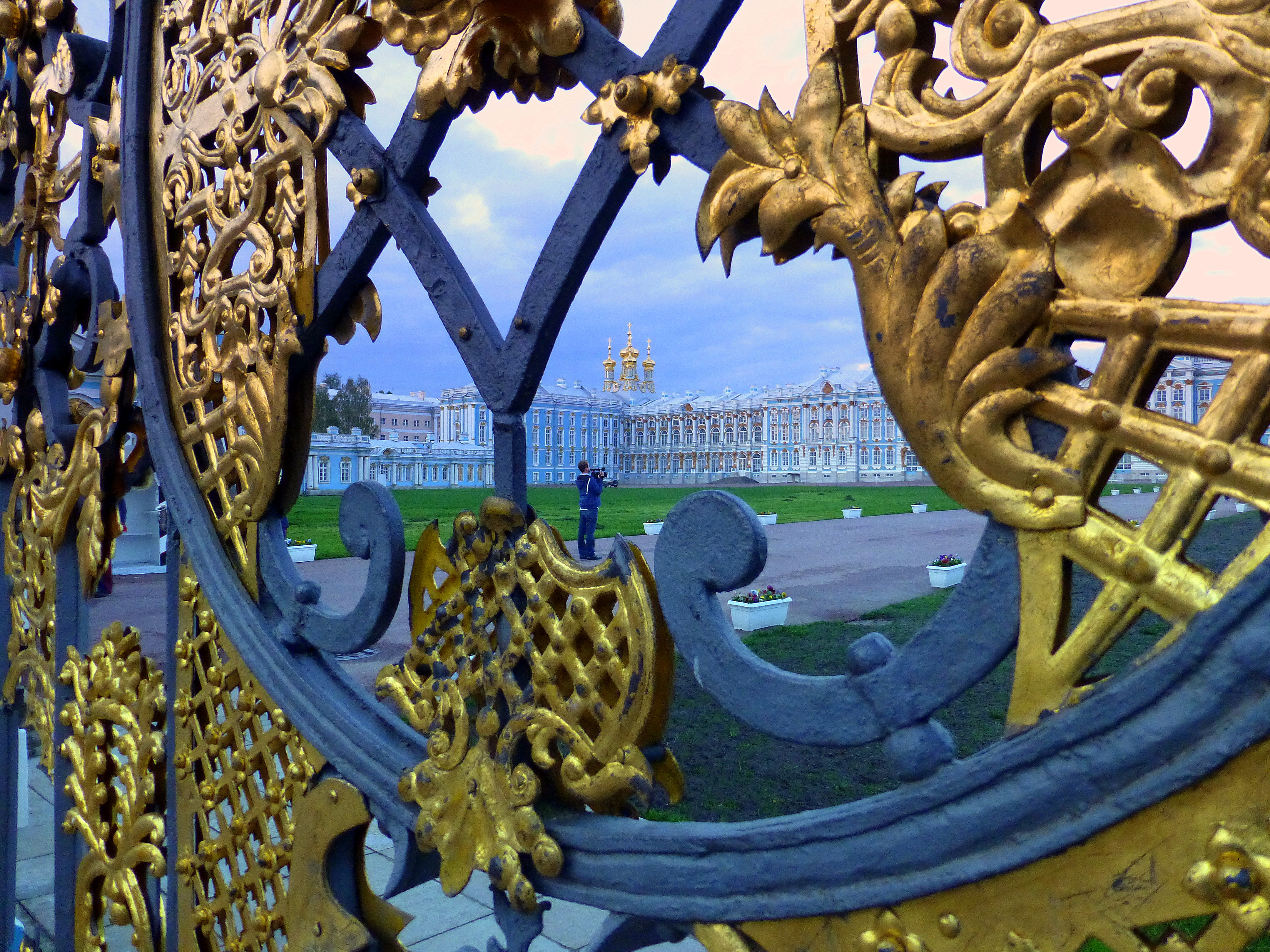 Russland - St. Petersburg - Good day or goodbye Great Catherine Palace --- Добрый день или до свидания Большой Екатерининский дворец